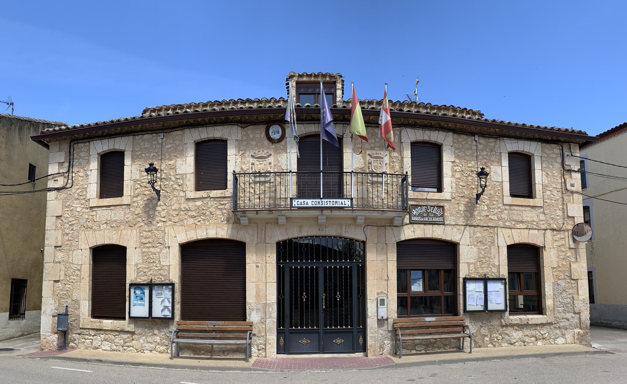 Ayuntamiento de Baños de Valdearados